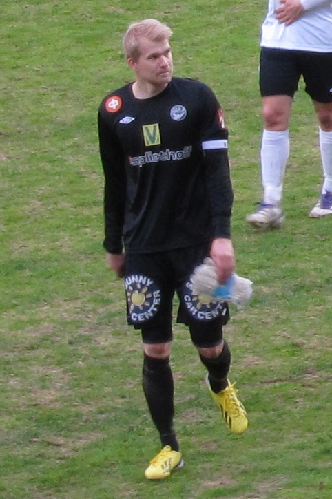 Saku Pesonen, suomalainen jalkapallomaalivahti FC Hakan joukkueessa kaudella 2013.